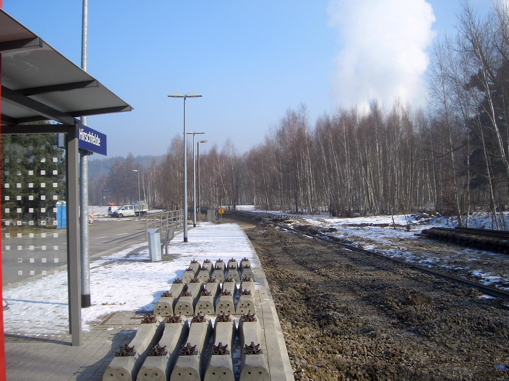 Sanierung der vom Hochwasser im August 2010 geschädigten Gleisanlage in Hirschfelde (Februar 2011).